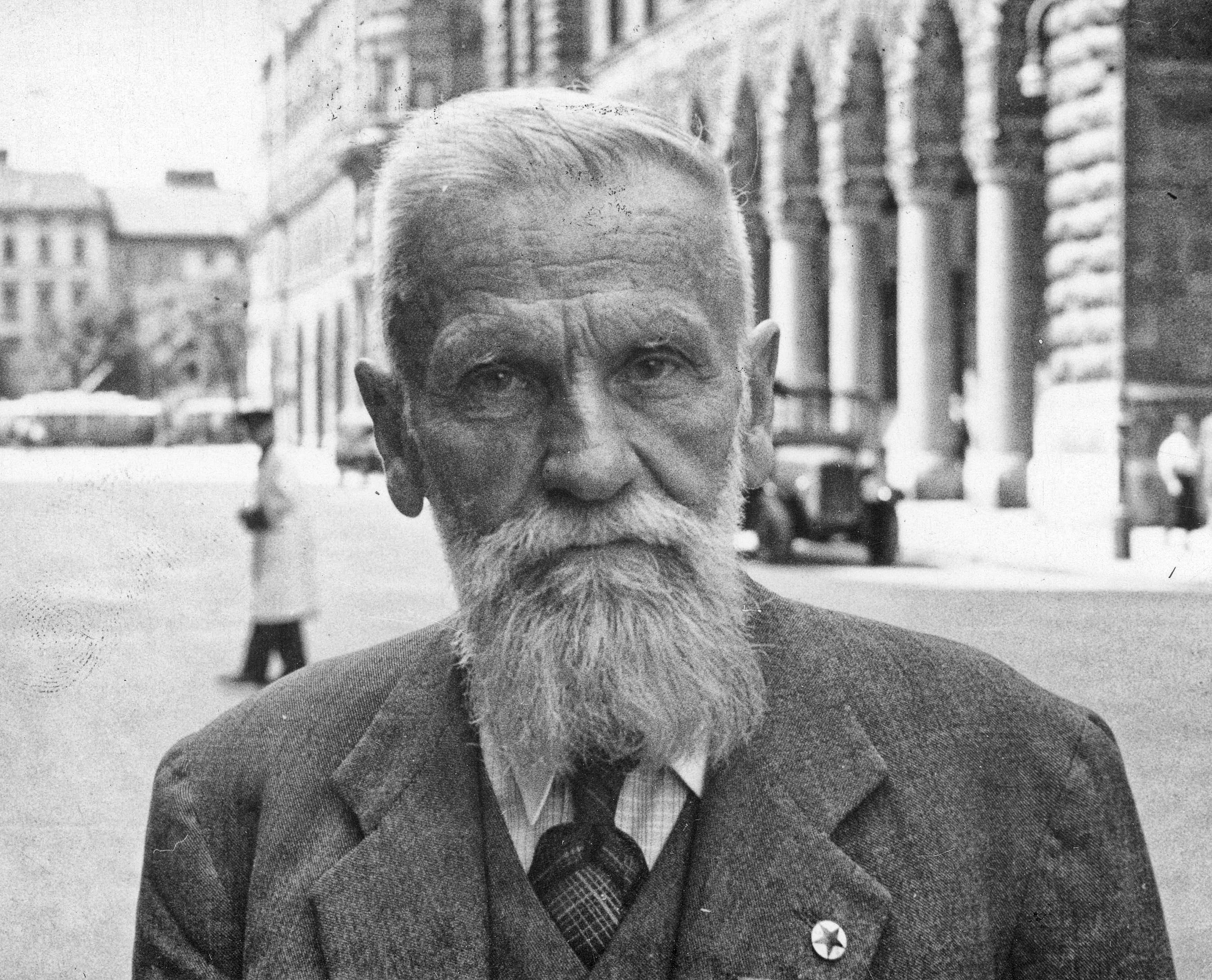 Odo Bujwid kun Esperanta stelo-marko